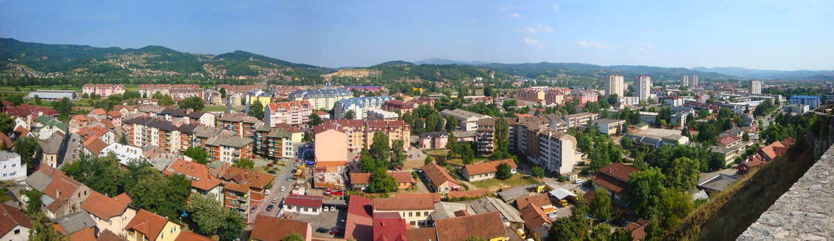 Добој, поглед са Градине.